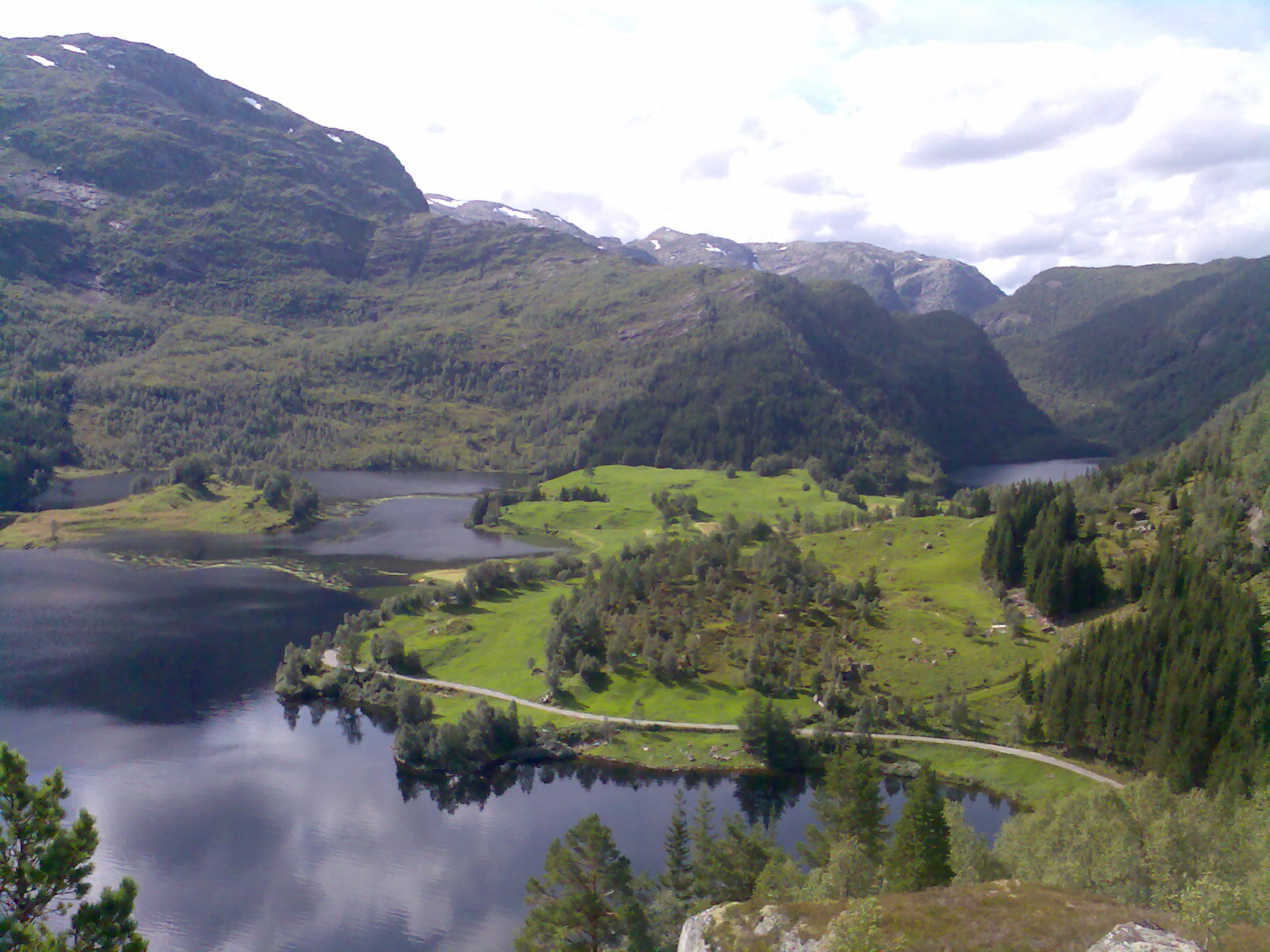 Bilde av parti frå Bergovatnet på Bergo i Eksingedalen. Eg har teke bildet sjølv. Fri bruk for alle.